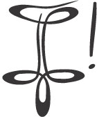 Zirkel der Landsmannschaft Hercynia Jenensis et Hallensis im CC zu Mainz